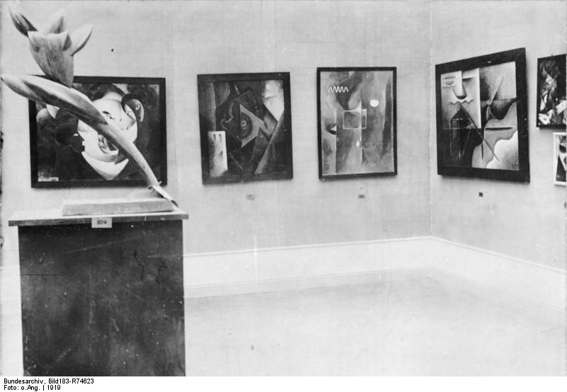 Große Berliner Kunstausstellung 1919 Blick in den Saal der Novembergruppe. Links die Plastik "Furioso" von Oswald Herzog. Aufn. Scherl-Illus